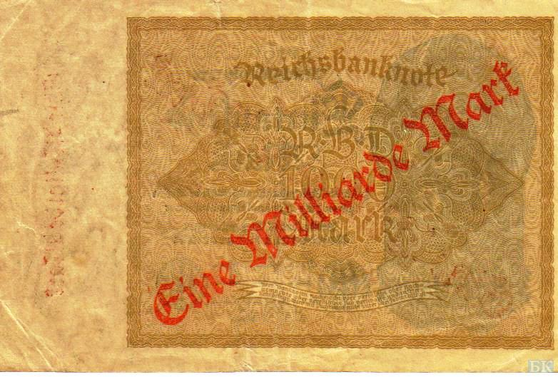 Миллиард немецких марок - надпечатка 1923 года на купюре 1000 марок 1922 года. Германия. 1923, реверс.